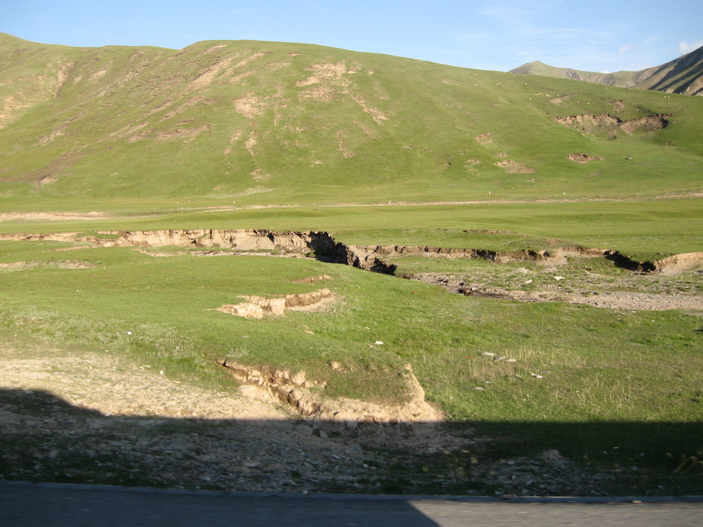 Qinghai-Tibet Plateau, 青藏高原